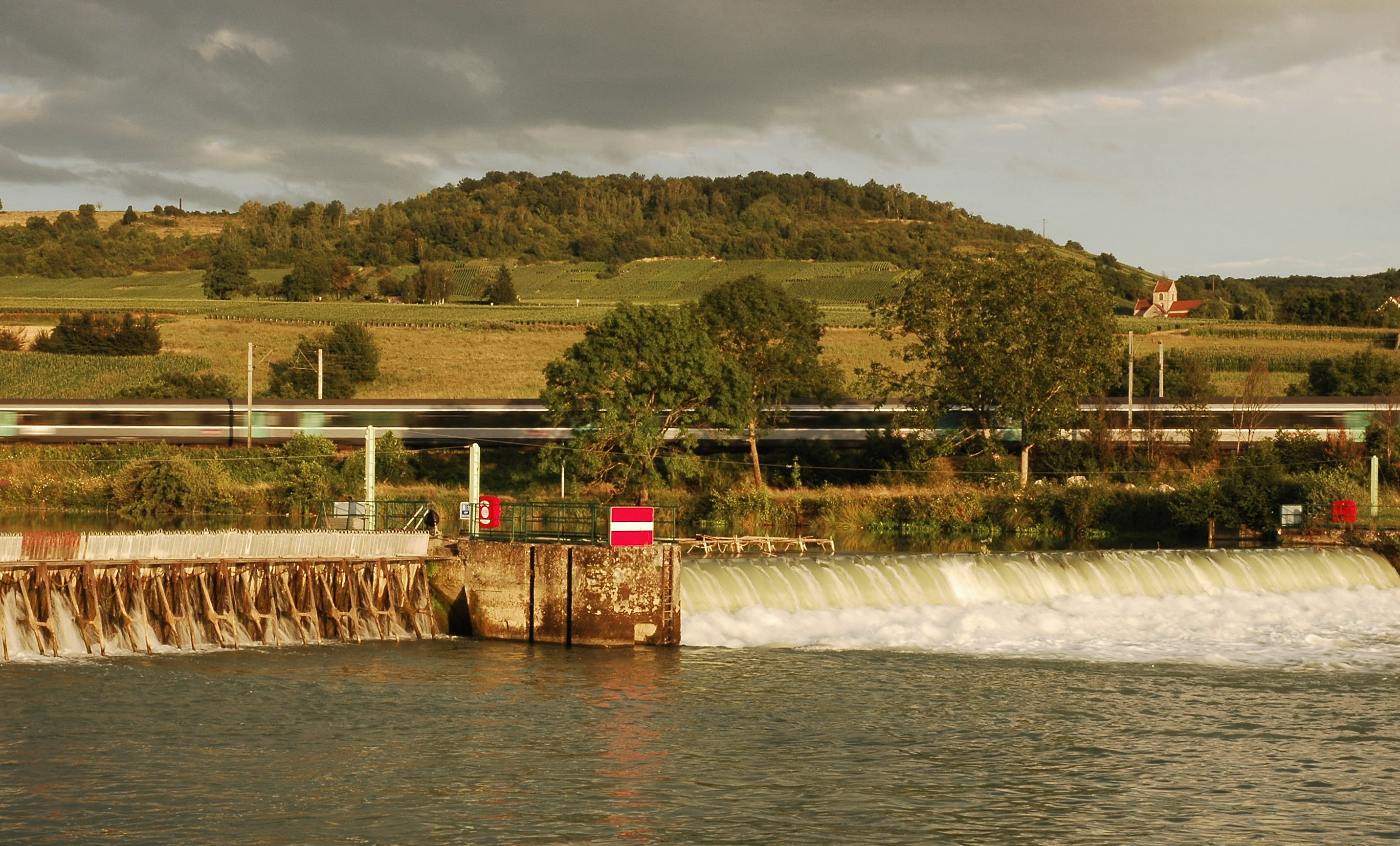 Ecluse du bord de Marne dans les environs de Dormans